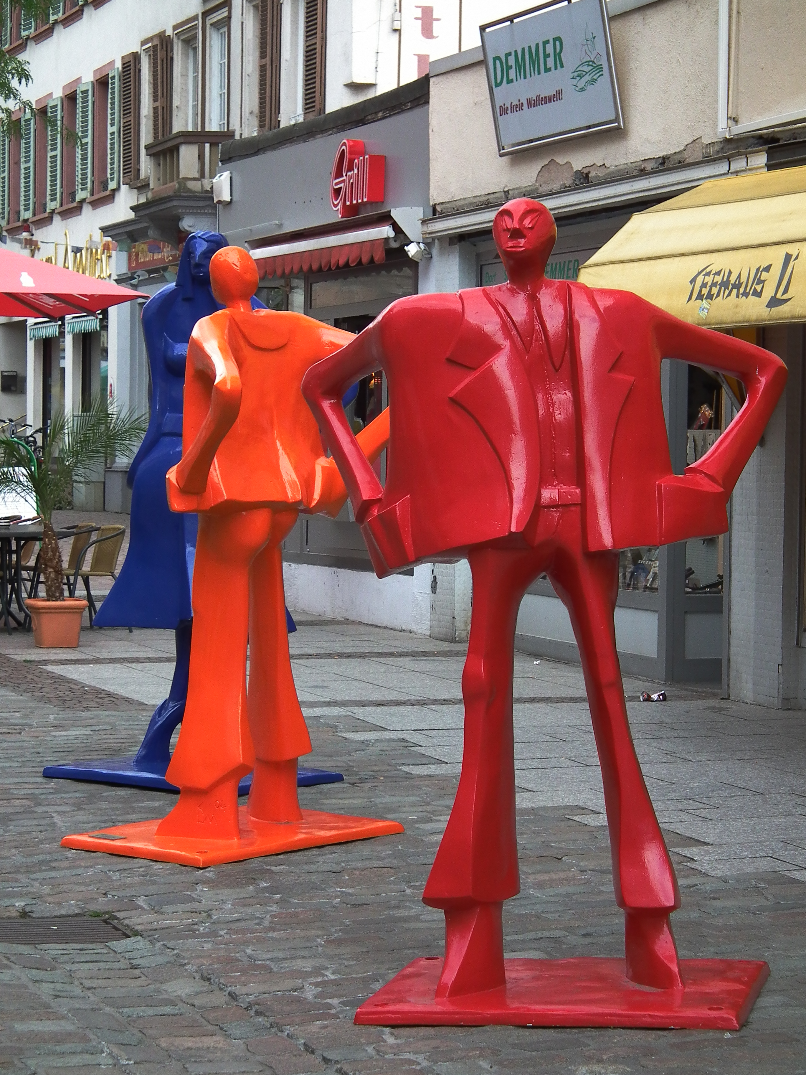 Skulptur "3 Stadtneurotiker" (2003/2004) von Kurt Laurenz Metzler, fotografiert in Landau (Rheinland-Pfalz, Deutschland)